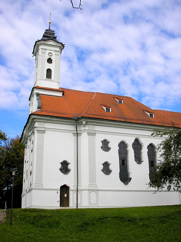 Votivkirche St. Thekla (Welden, Landkreis Augsburg, Bayerisch-Schwaben). Ansicht von Süden. Eigene Aufnahme, Sept. 2007 / St. Thekla (Welden near Augsburg, Bavaria, Germany). View from the south. Own photo, Sept. 2007